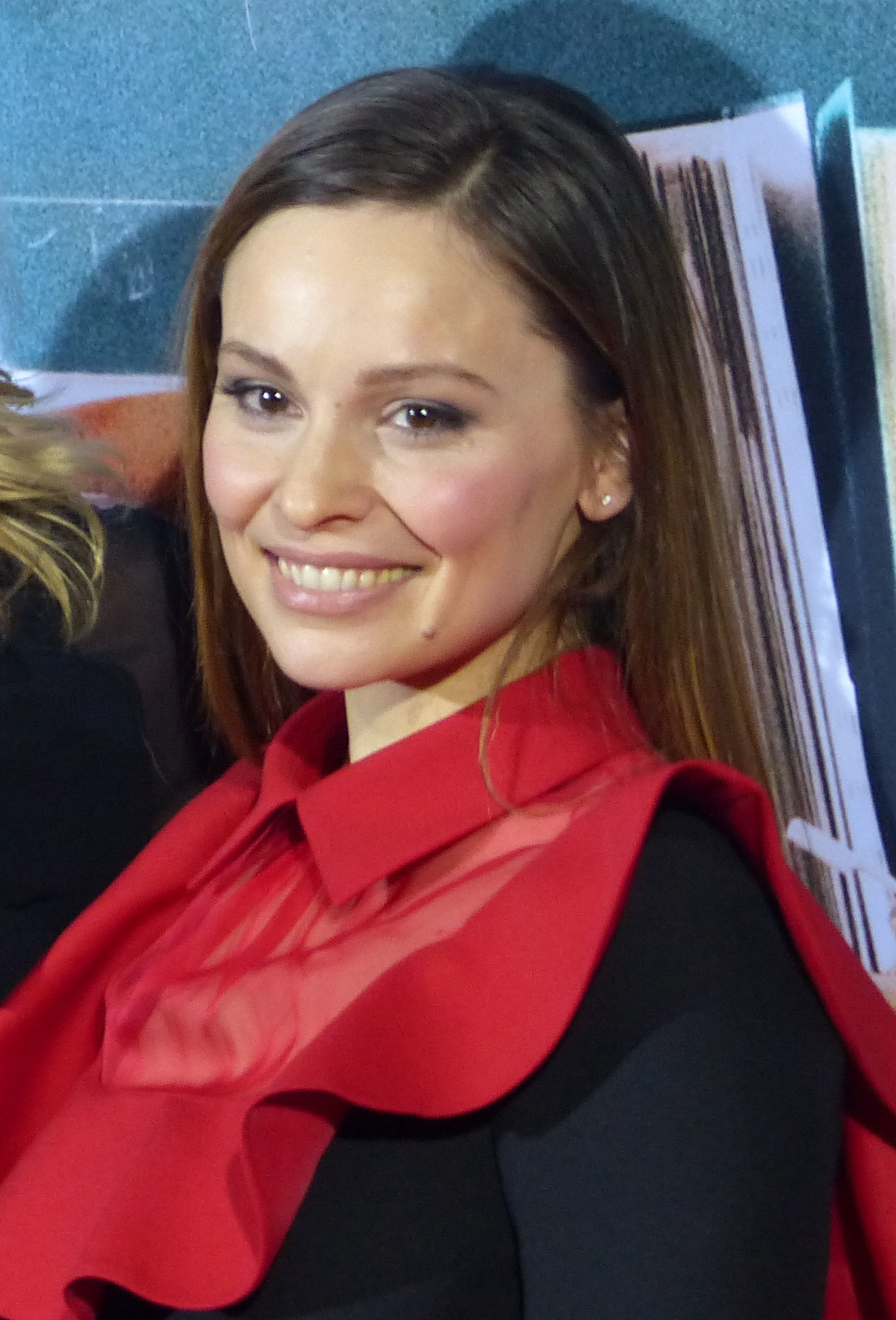 Mina Tander bei der Kinopremiere von "Frau Müller muss weg", Januar 2015, Cinedom Köln